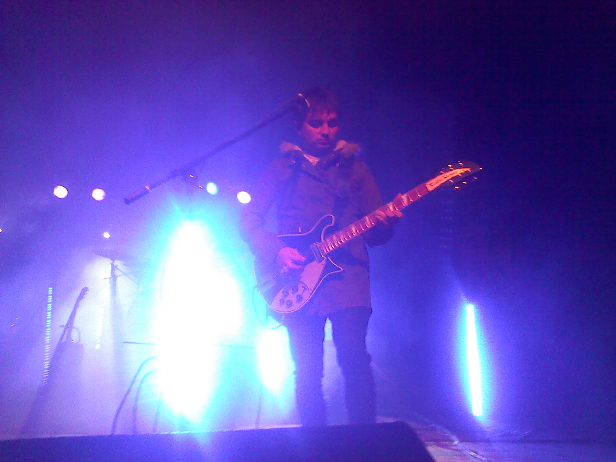 En Laja